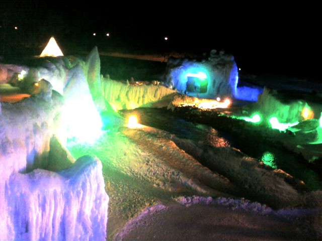 Hyoubaku Festival, Hokkaido, Japan on March 2006.